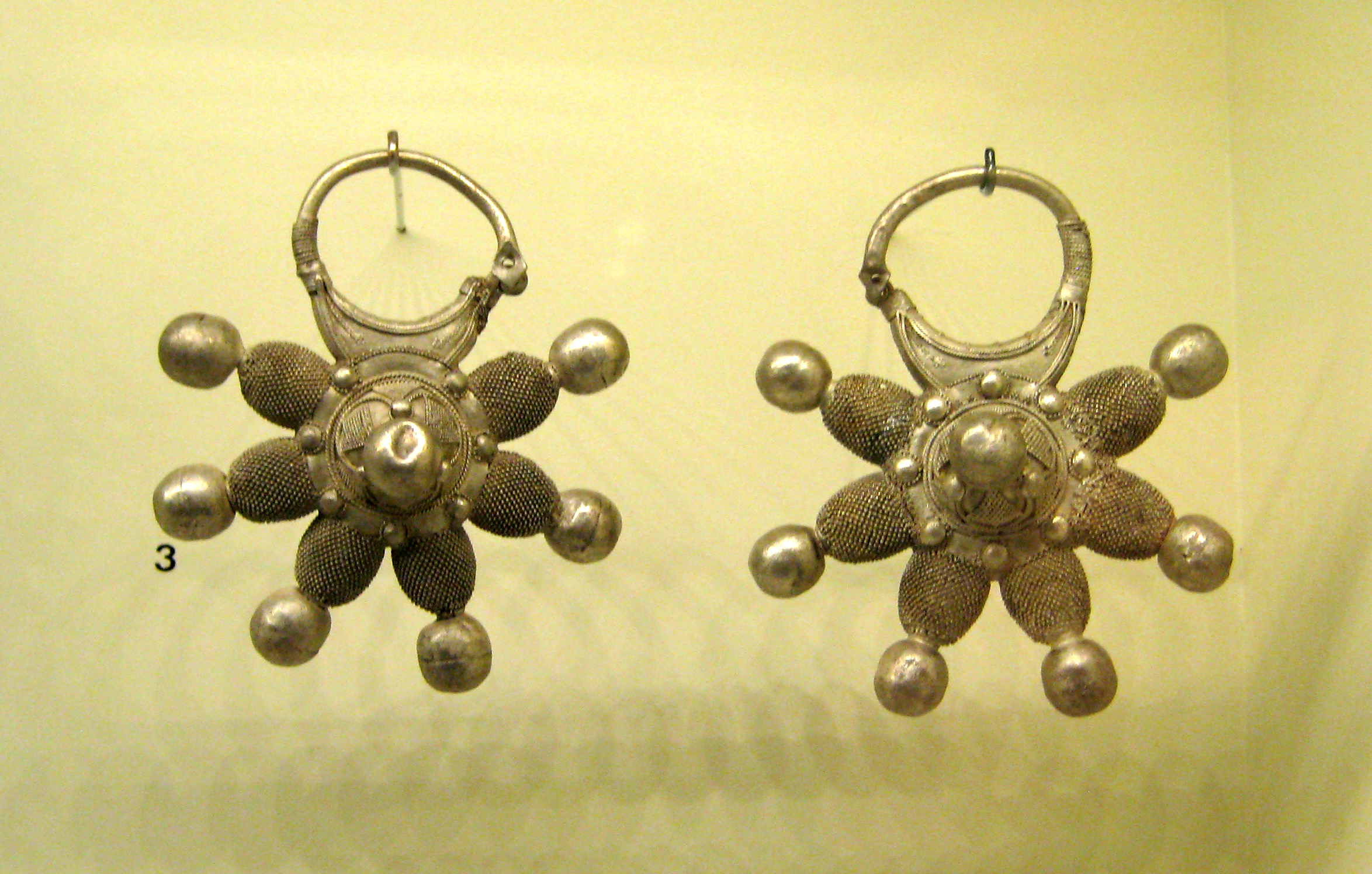 Клады, выставленные в подклете Благовещенского собора Московского кремля. Шестилучевые колты - подвески к головному убору. Русь, 12 век. Серебро, пайка, зернь, скань.